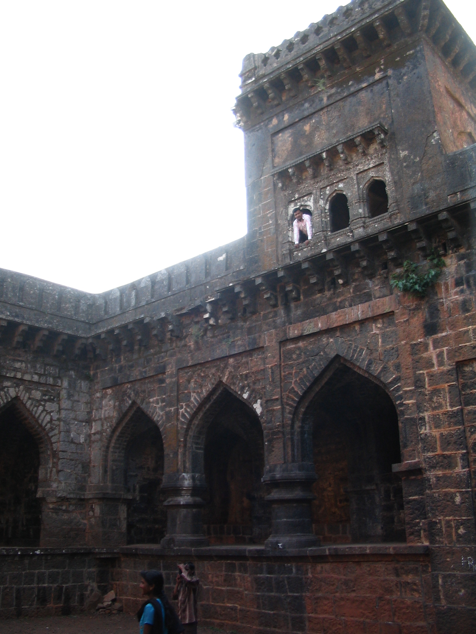 Panhala fort, Maharashtra, India